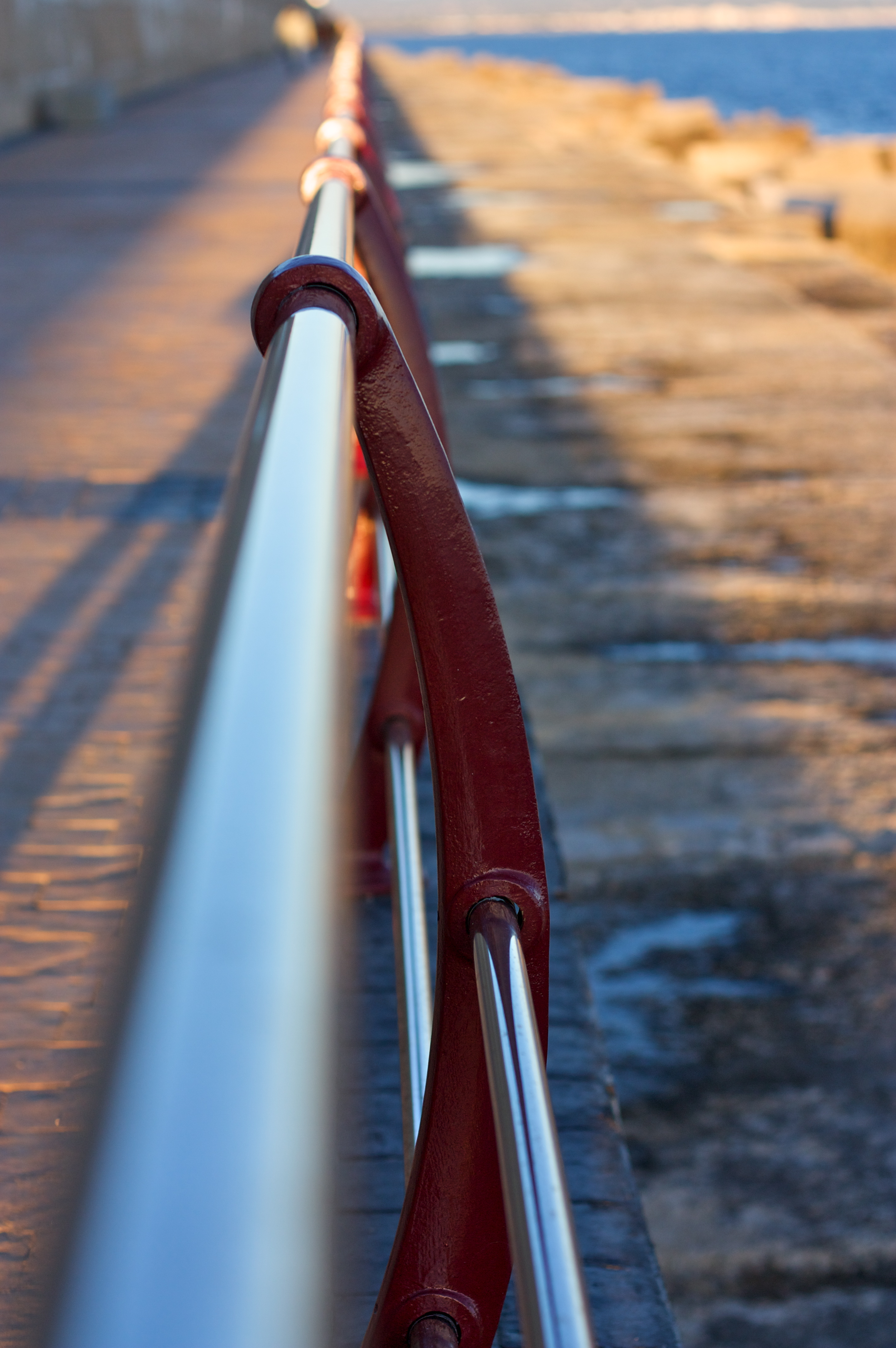 Barandilla